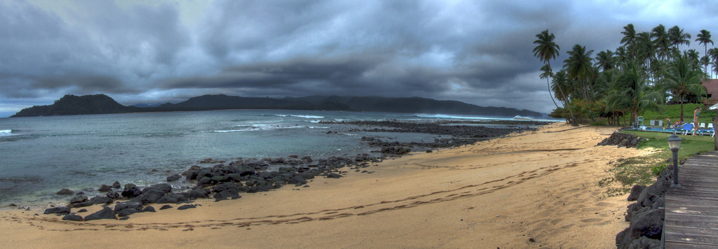 São Tomé - Ilhéu das Rolas, São Tomé and Príncipe Ver no mapa / See on map: Clique aqui / Click Here